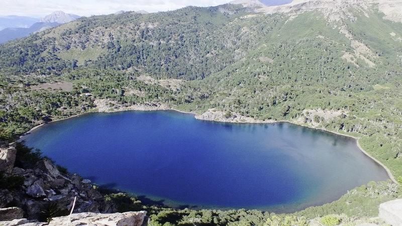 Vista desde el mirador